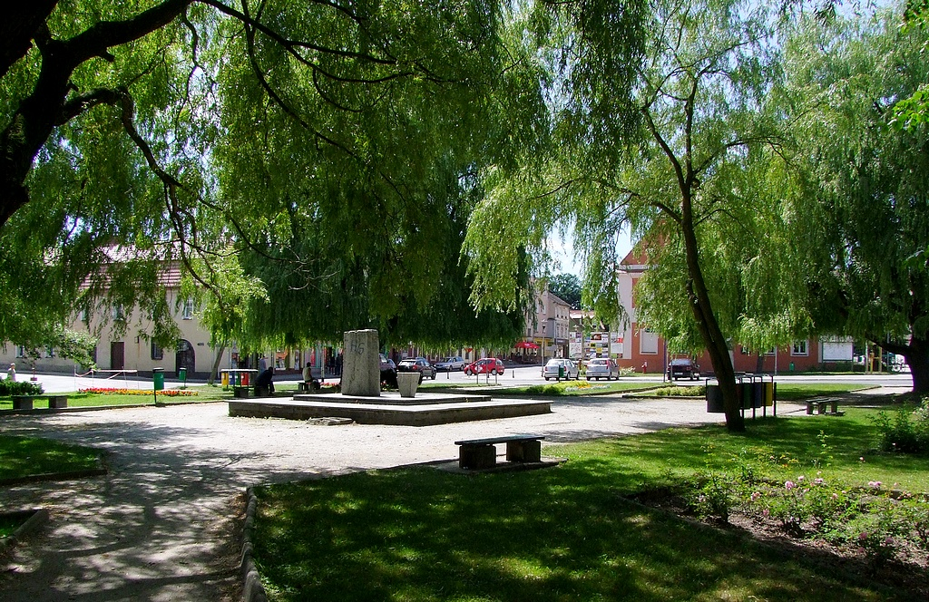 miasto (ośrodek historyczny), nr rej.: A/896/353 z 25.11.1956 - park